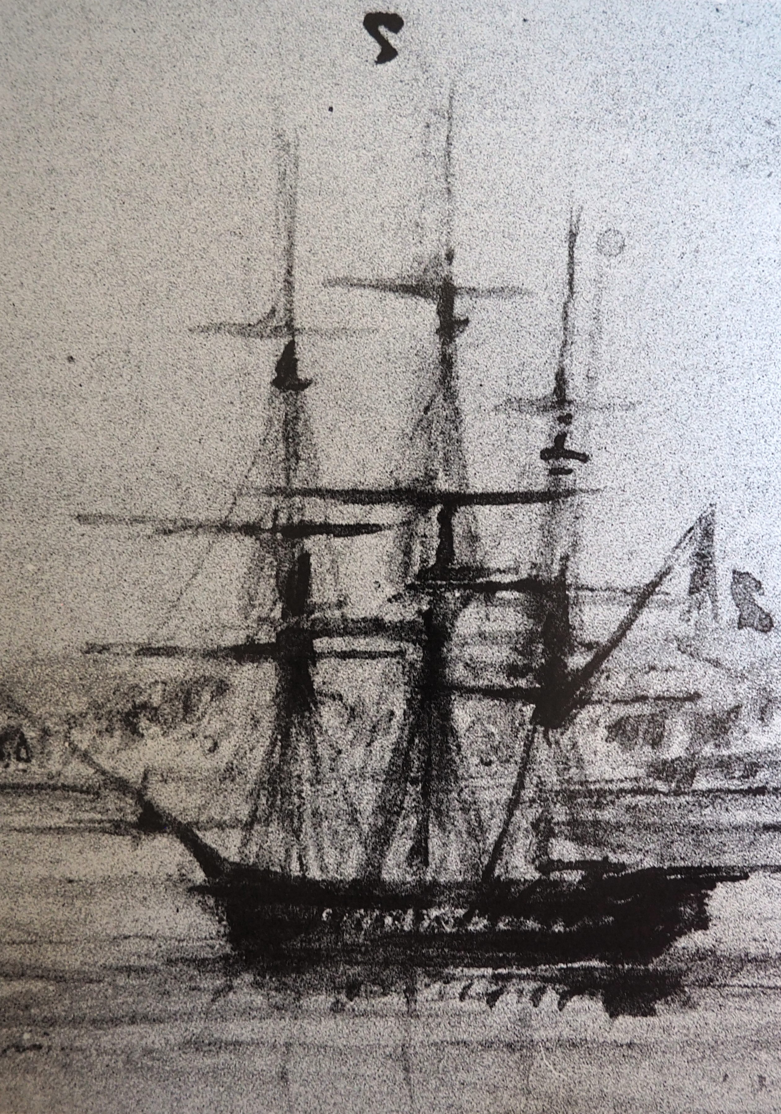 Médée anchored at Vera-Cruz in 1838. Musée national de la Marine, Ph 168 041